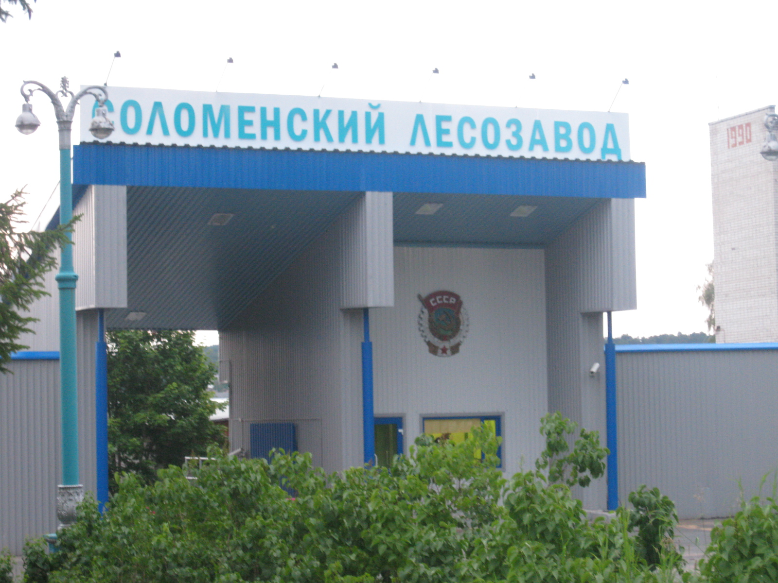 Промышленность Петрозаводска